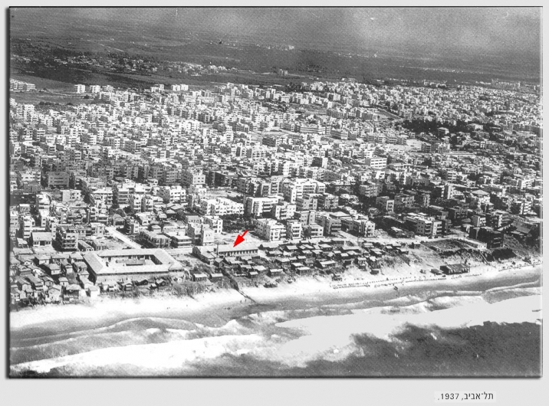 שכונת מחלול, תל אביב 1937 המתחם המרובע בשמאל התמונה (לכיוון צפון) הוא בית החרושת לעיבוד עורות של האחים לבקוביץ שהסליק בקרבו את מכון א' של ההגנה. מעל למתחם ניתן להבחין ברחוב עם ישראל חי המקשר בין רחוב הירקון לרחוב ארנון. בפינת עם ישראל חי ורחוב ארנון, 'הבית הכחול'. מימין ל'לבקוביץ' מסומן בחץ אדום, בית החרושת לאריגת משי, 'דלפינר'. בימין התמונה, על הרכס, הבית האדום, לשמאלו, בית אגודת יורדי ים זבולון, (הבית הלבן המלבני).